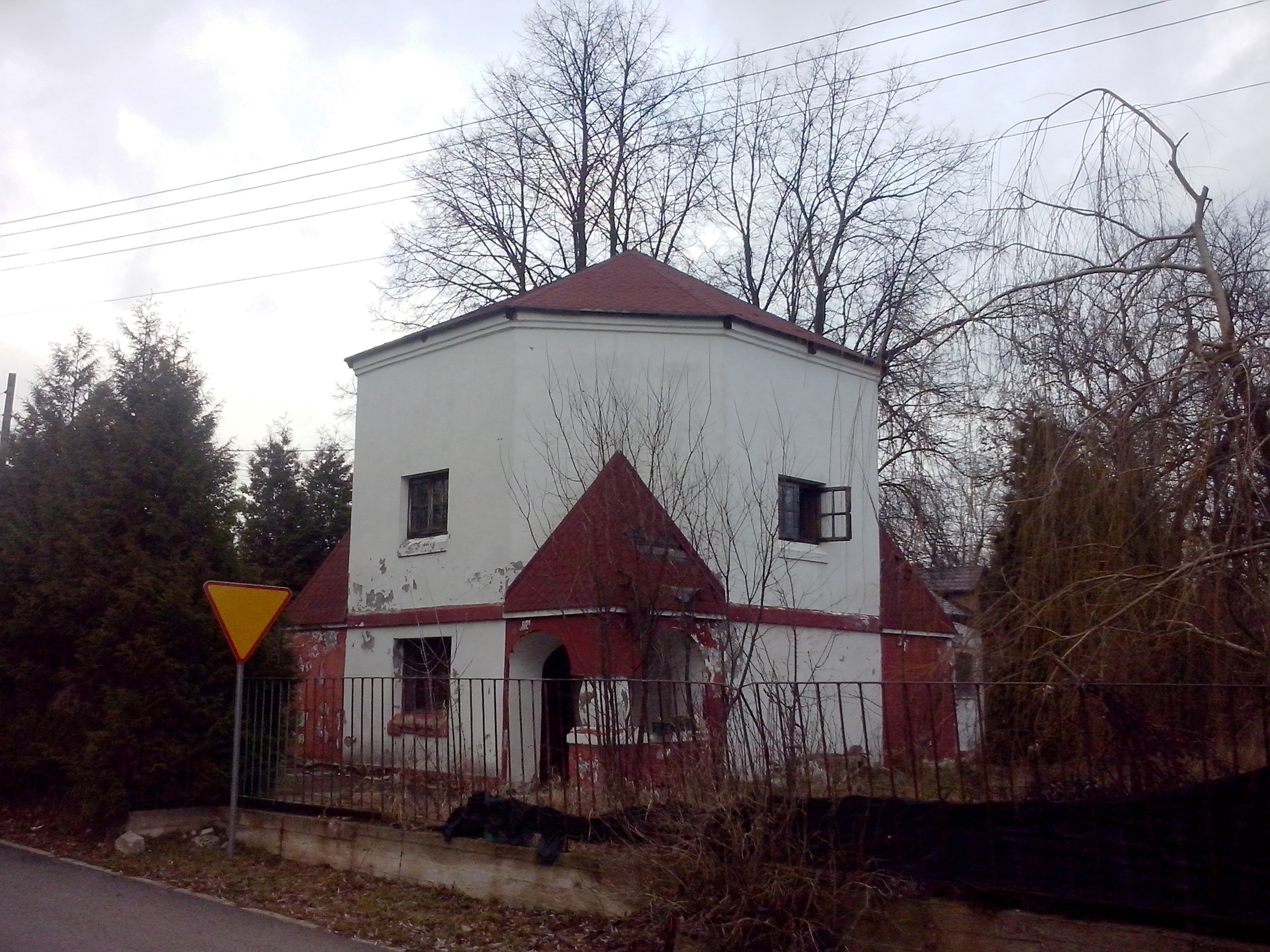 Dębe (gm. Serock, pow. Legionowo) - tzw. "Okrąglak" - dawna cerkiew przy miejscowym majątku będącym w I poł. XIX w. w rękach rosyjskich